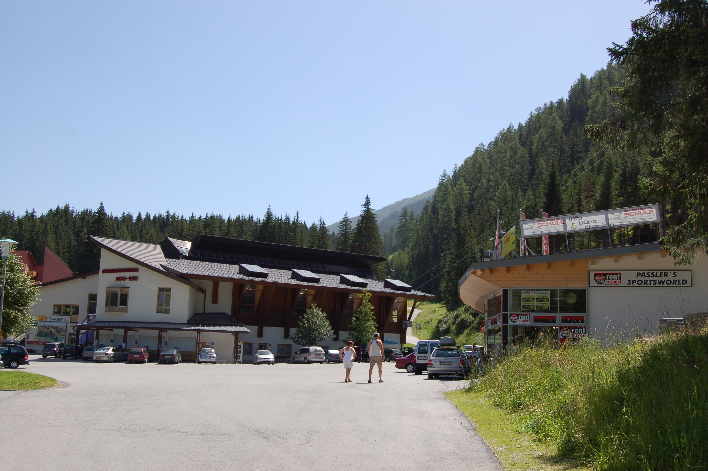 Brunnalm Bergbahnen in Sankt Jakob in Defereggen